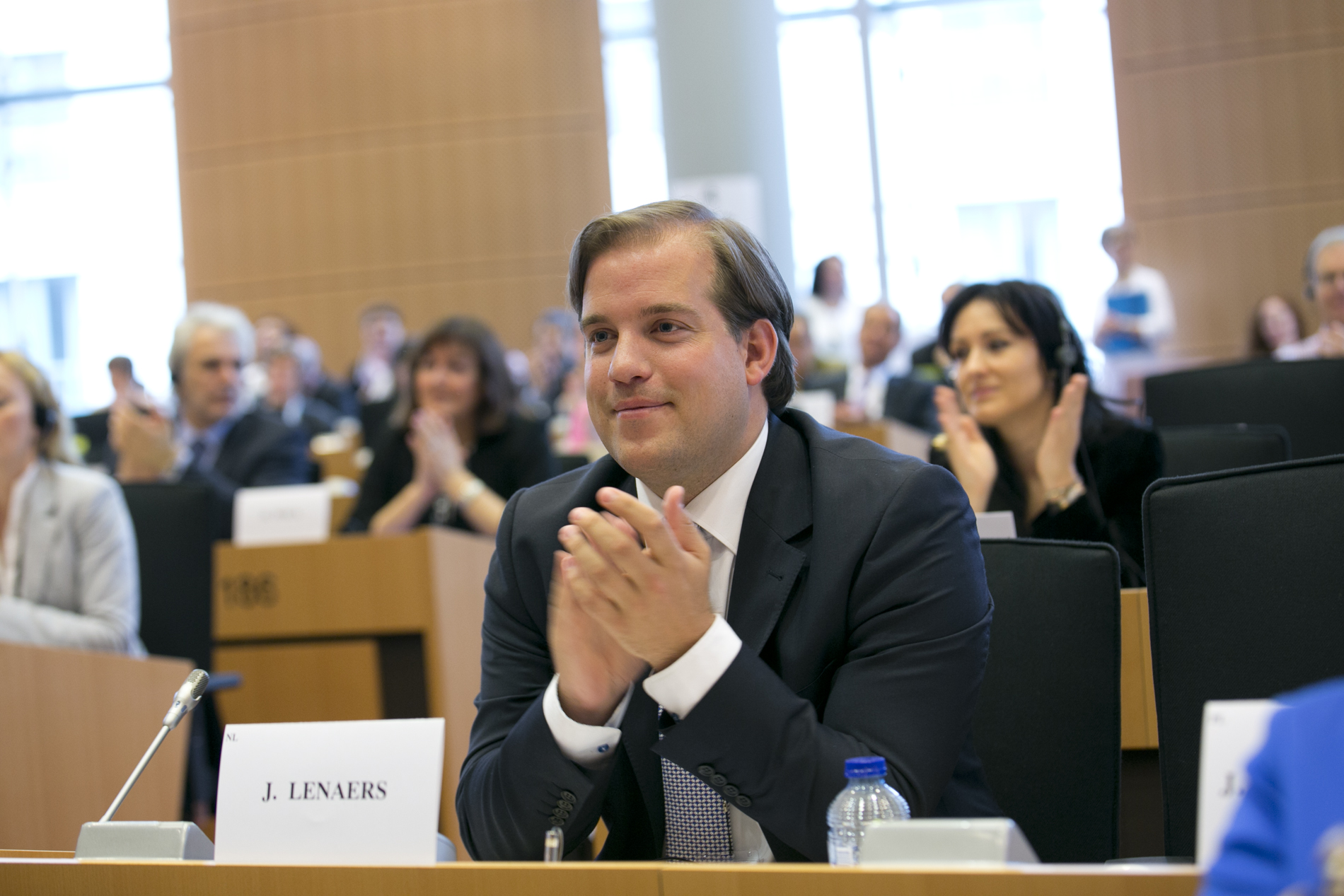 Jeroen Lenaers bij eerste fractieberaad EVP Groep (waartoe CDA behoort) in het Europees Parlement